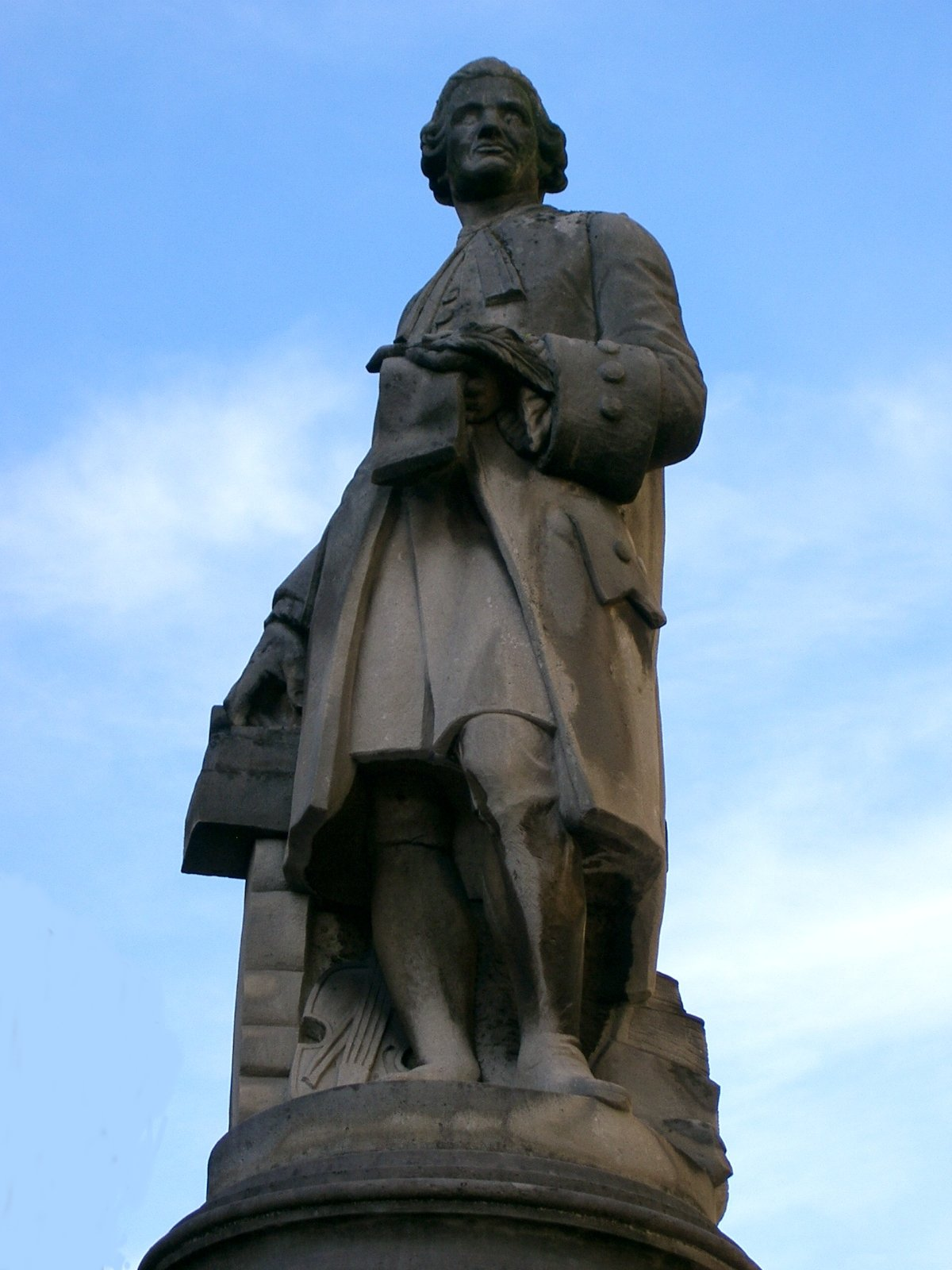 statue du XIXe siècle : Rameau par E. Guillaume à Dijon photo personnelle PRA